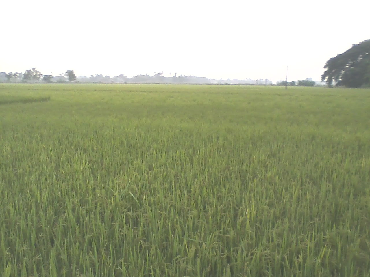 ধান জমি